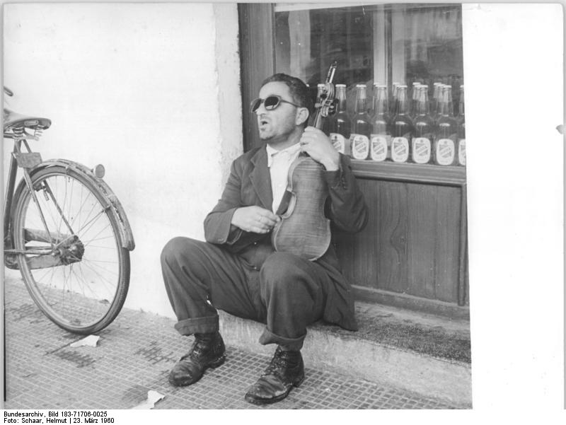 Zentralbild Schaar-23.3.1960 Erste Fahrt des FDGB-Urlauberschiffes "Völkerfreundschaft". Ende Februar 1960 startete das erste FDGB-Urlauberschiff "Völkerfreundschaft" zu einer 27tägigen Ferienreise von Rostock aus ins Mittel- und Schwarze Meer. UBz: Straßenmusikant in Rhodos (Griechenland).